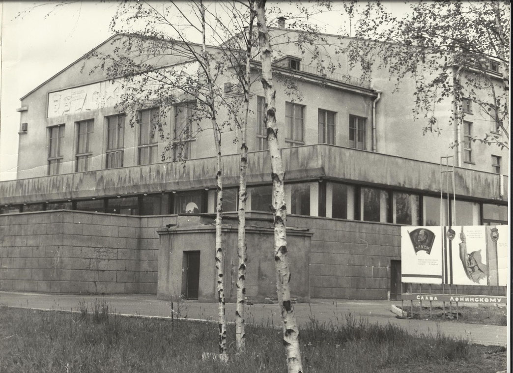 Рыбинск. Дворец культуры «Кабельщик»